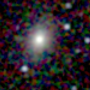 Galaxy NGC 49